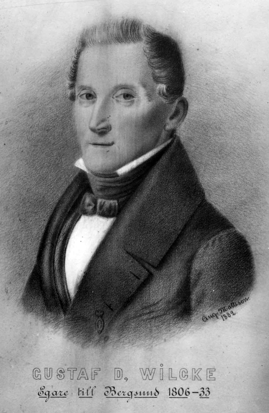 Porträtt av varvsägare, grosshandlaren, bruksägaren m.m. Gustaf Daniel Wilcke (22 november 1776 - 4 oktober 1863). På kavajslaget: Vasaorden, den s.k. "Vasatrissan" innan den ritades om av Christian Hammer 1860